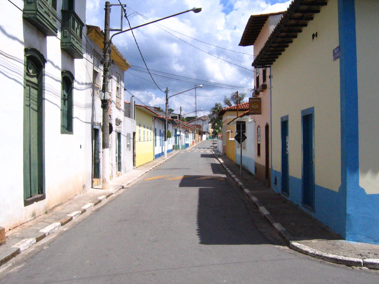 Centro velho de Santana do Parnaíba